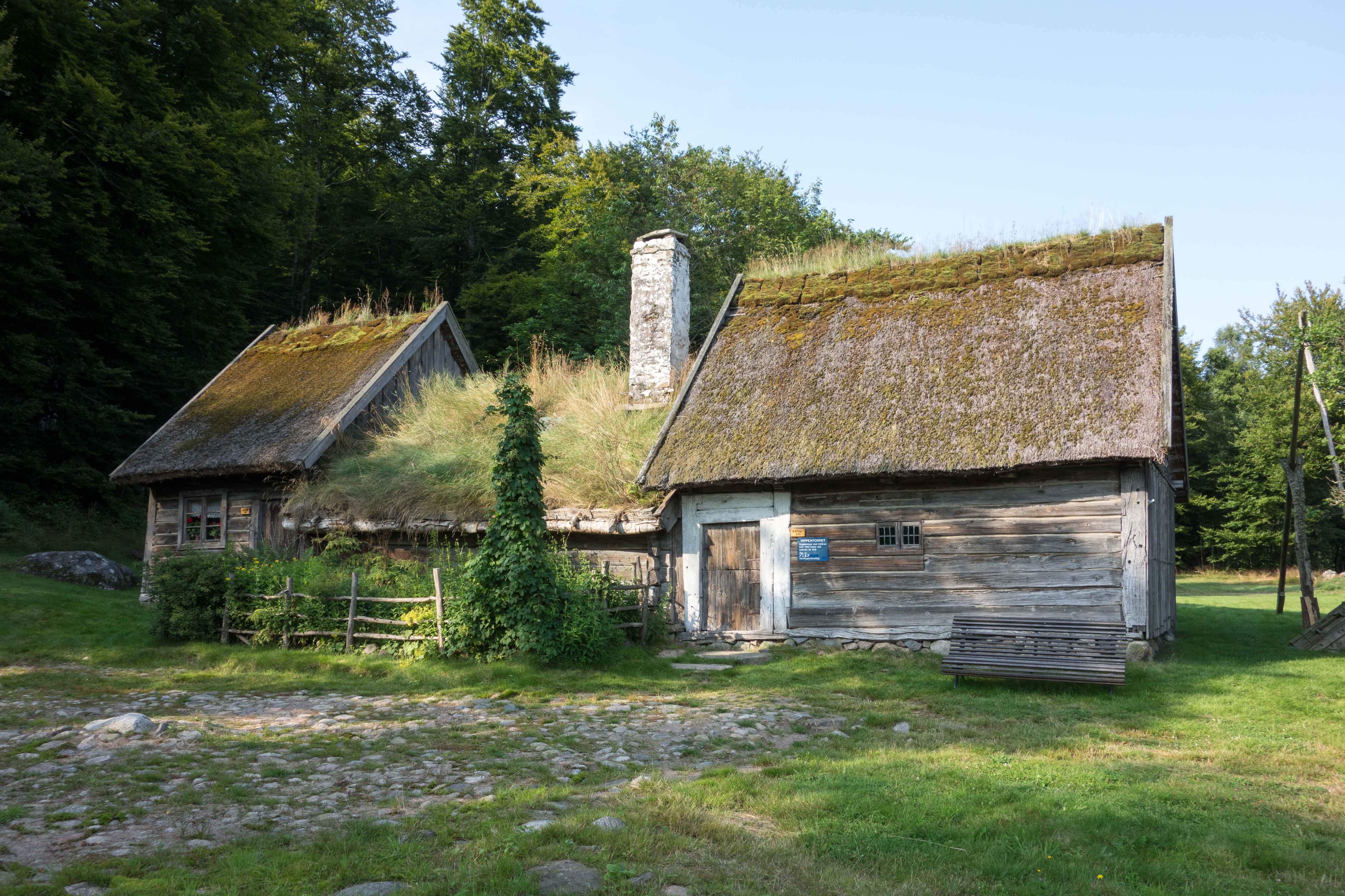 Vippentorpet (Bygget 1:3)